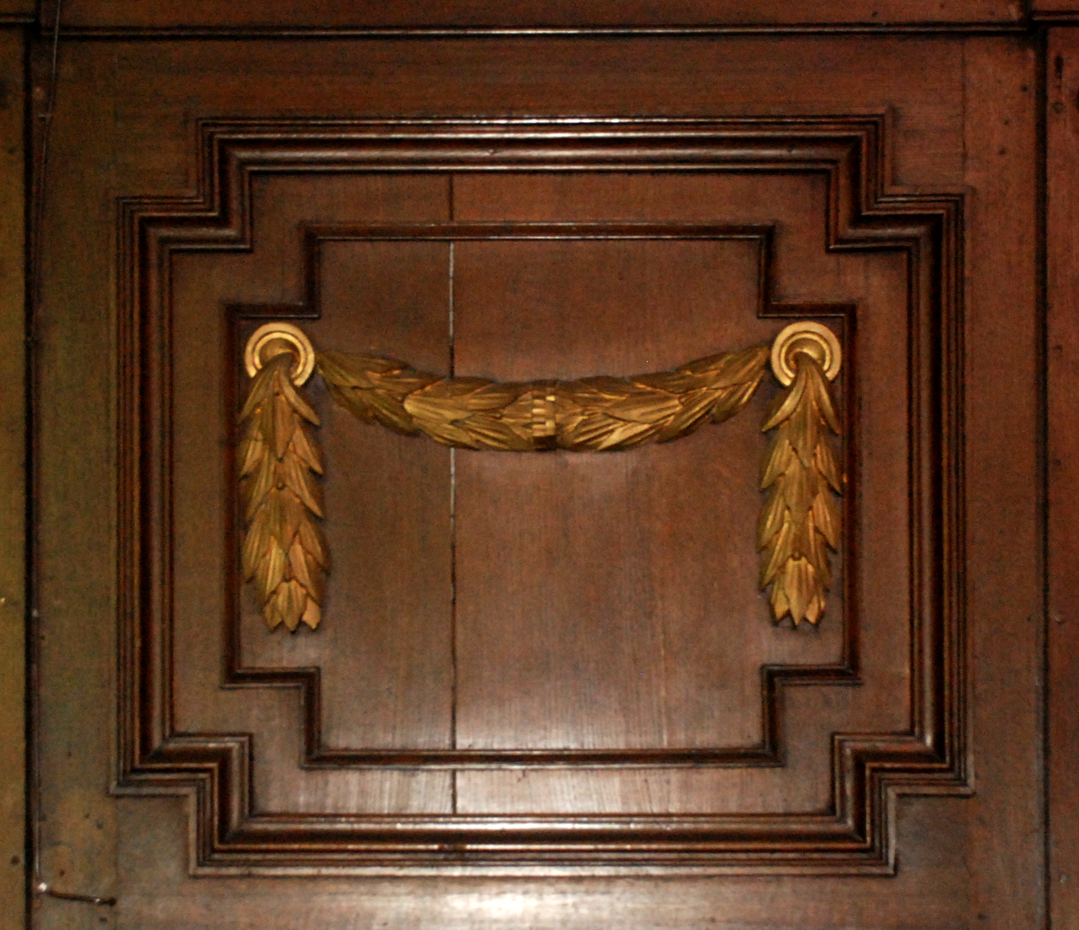 Belgique - Brabant wallon - Église de Court-Saint-Étienne